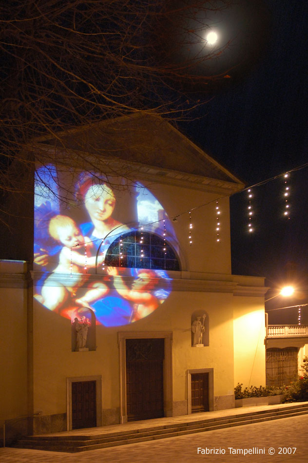 Malvaglio, frazione di Robecchetto con Induno: la chiesa parrocchiale addobbata per il Natale 2006.